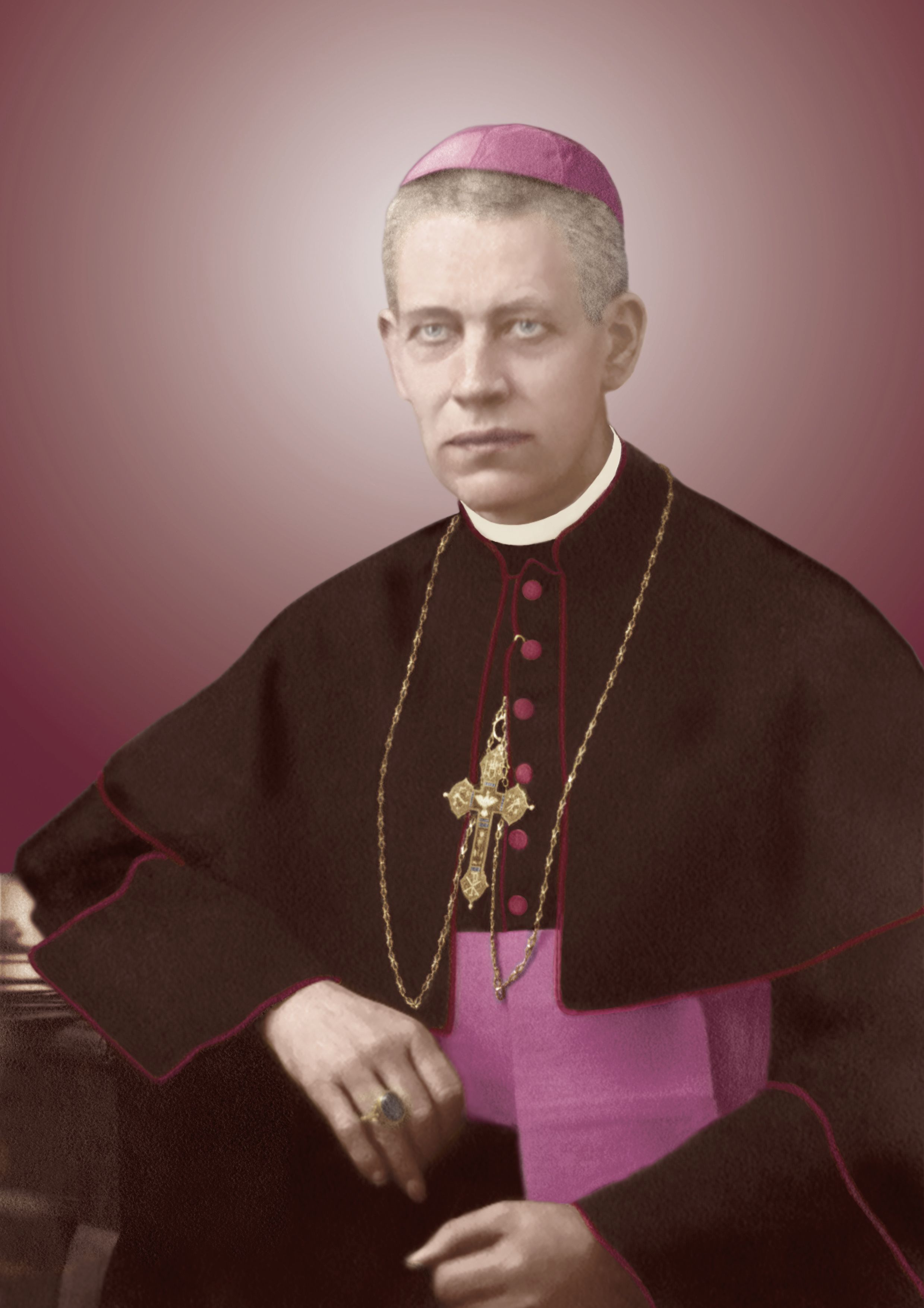 Ritratto del vescovo Anton Durcovici